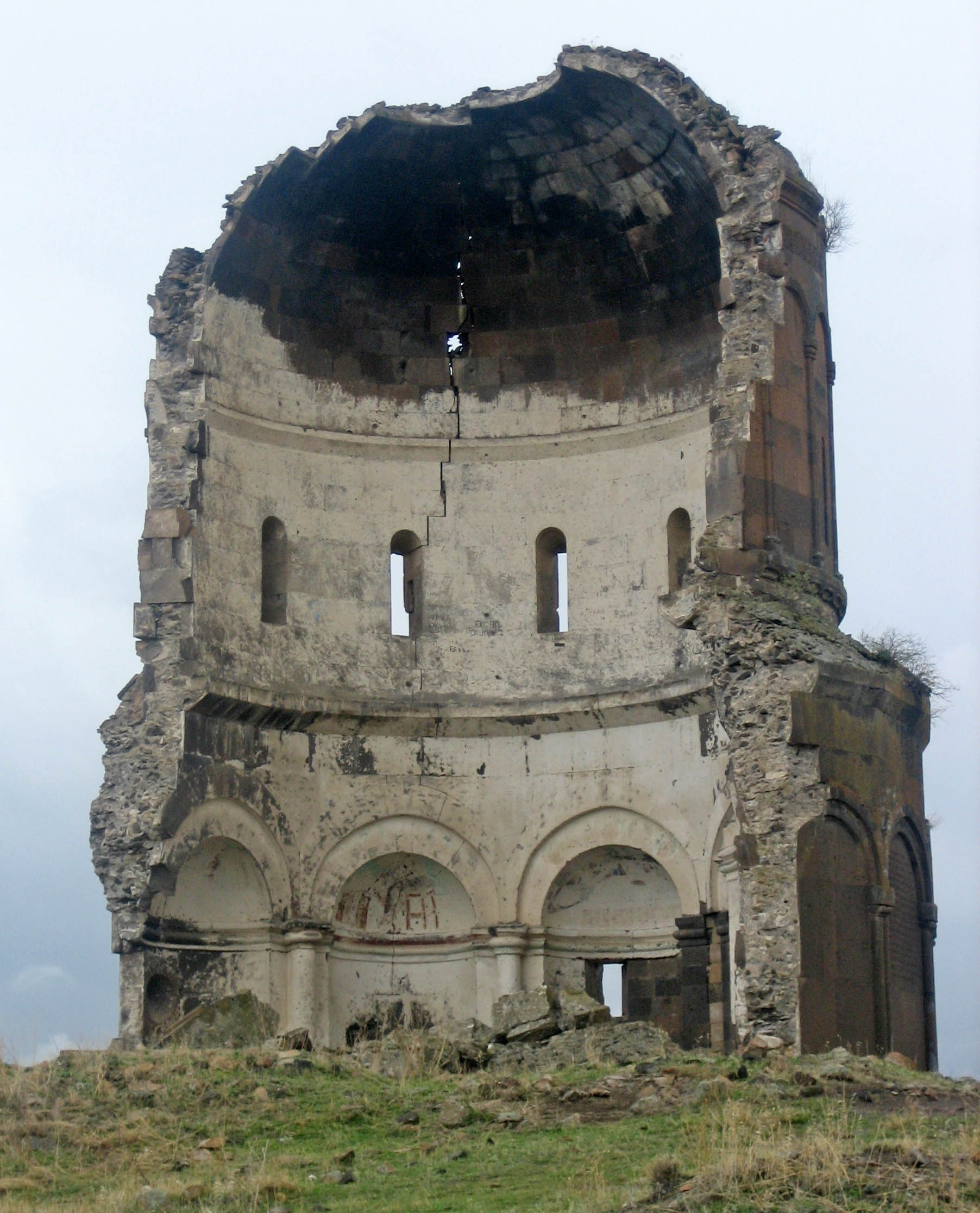 Ani sehrinde yikik kubbe